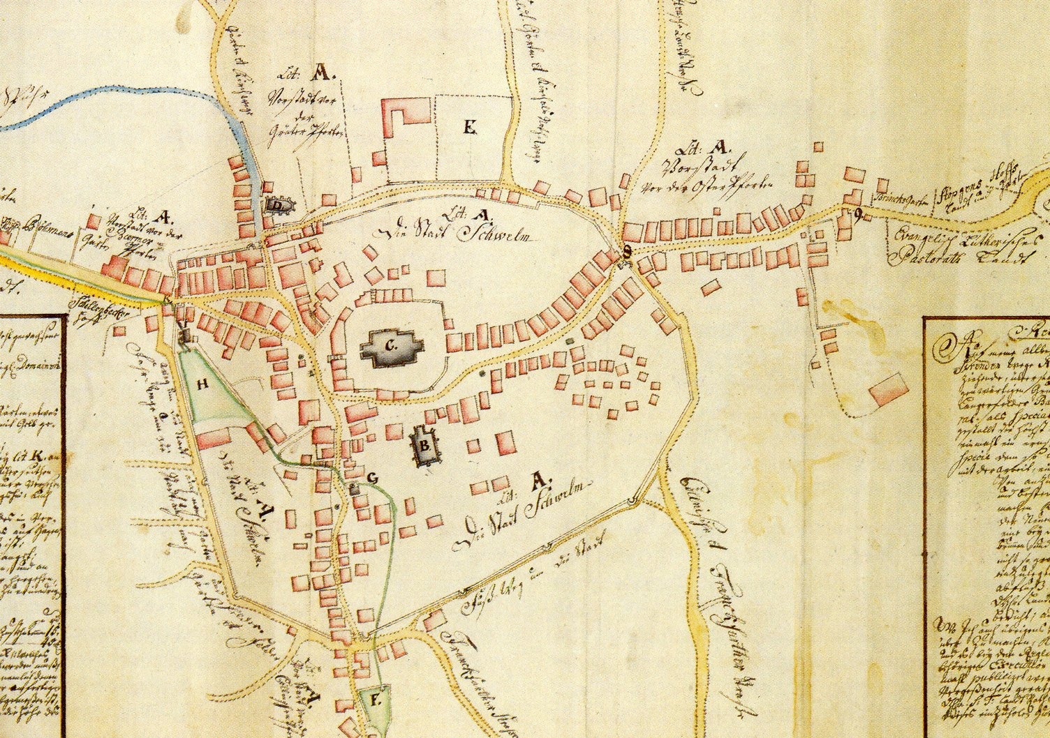 Ausschnitt einer Karte der Stadt Schwelm im Jahre 1755 (kolorierte Federzeichnung)